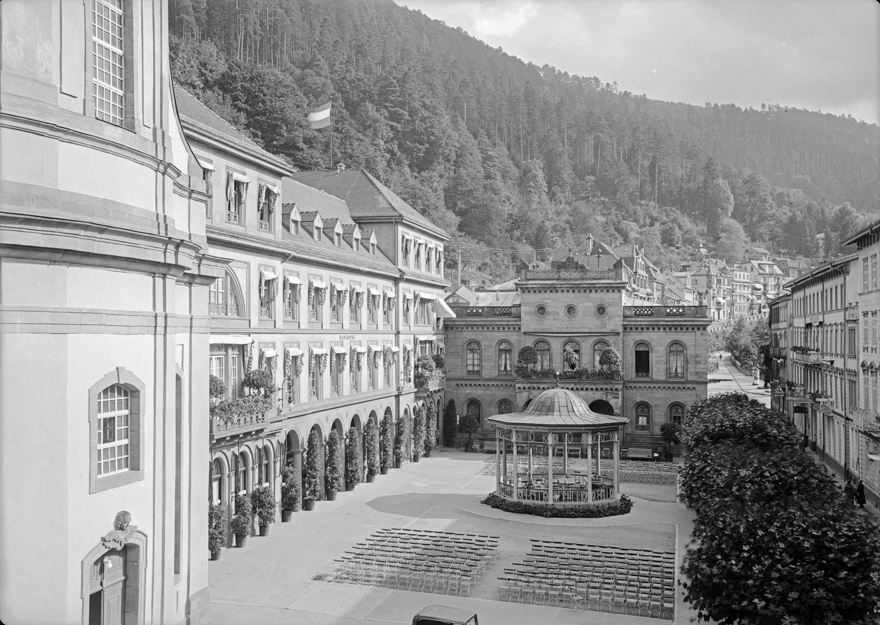 Kurplatz mit Badhotel und Eberhardsbad in Wildbad im Schwarzwald